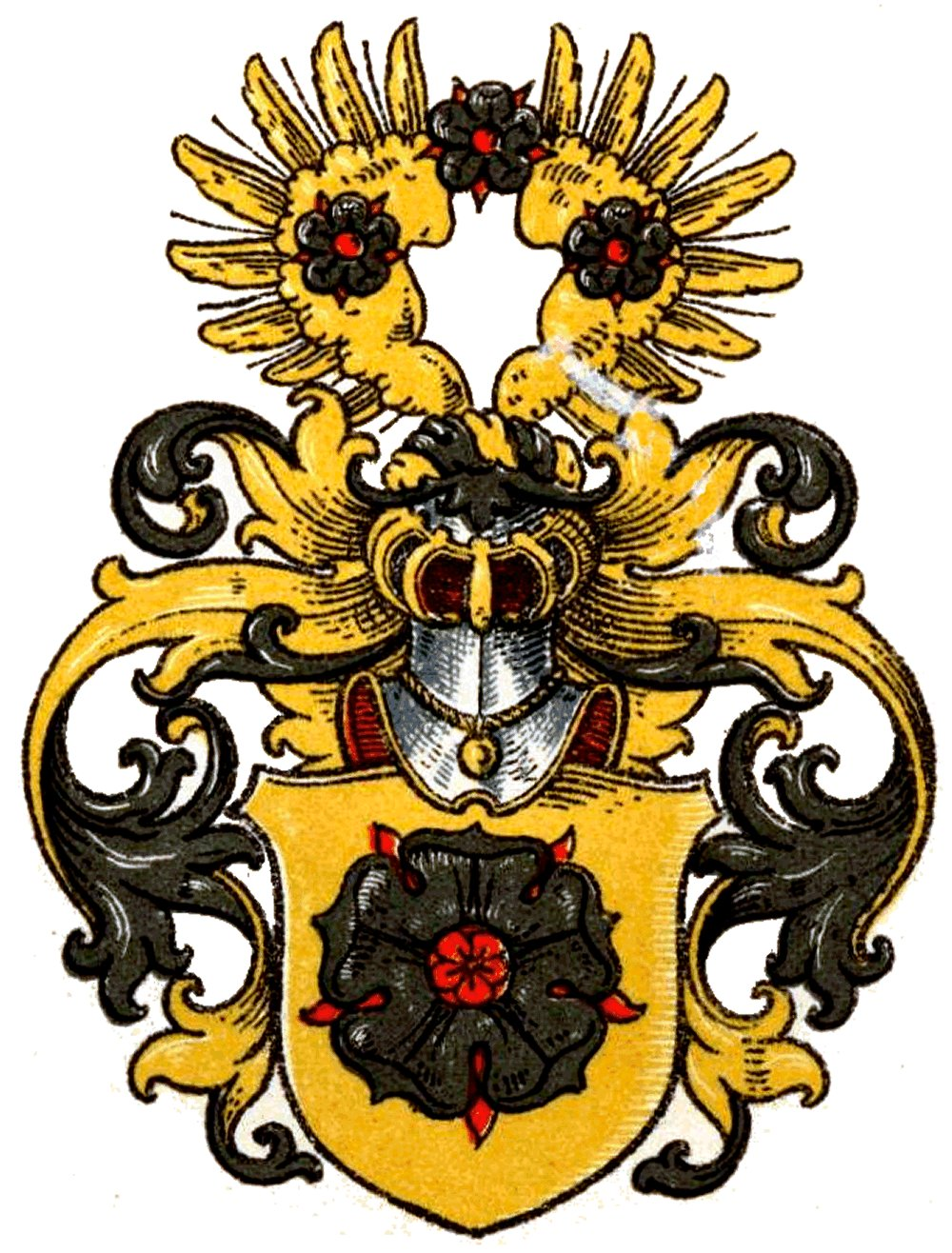 Wappen derer von Bose (Bosen) Beschreibung im Wappenbuch des Westfälischen Adels: Im Bisthum Paderborn und im Corveyschen. – W.: in G. s. Rose mit r. Innern. Helm offener g. Flug je mit einer s. Rose belegt, die dritte dazwischen. – Q.: Staatsarchiv Münster. – Das Geschlecht blühte noch 1708.